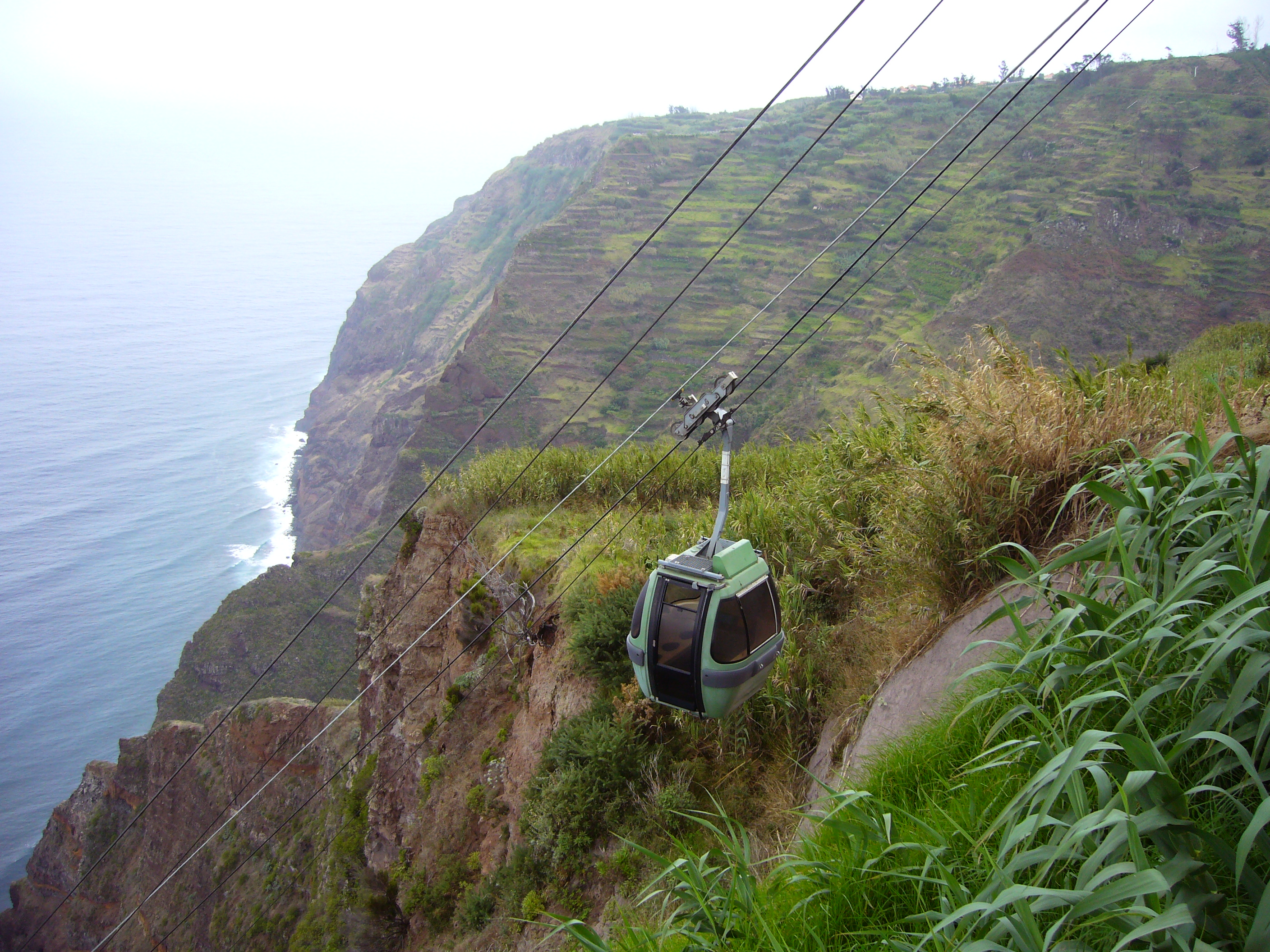 Cableway near Achadas da Cruz - Madeira